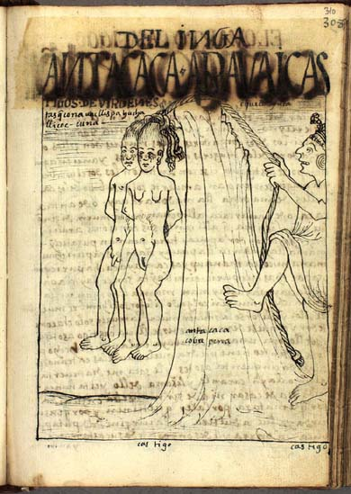 Castigo di vergini del Sole